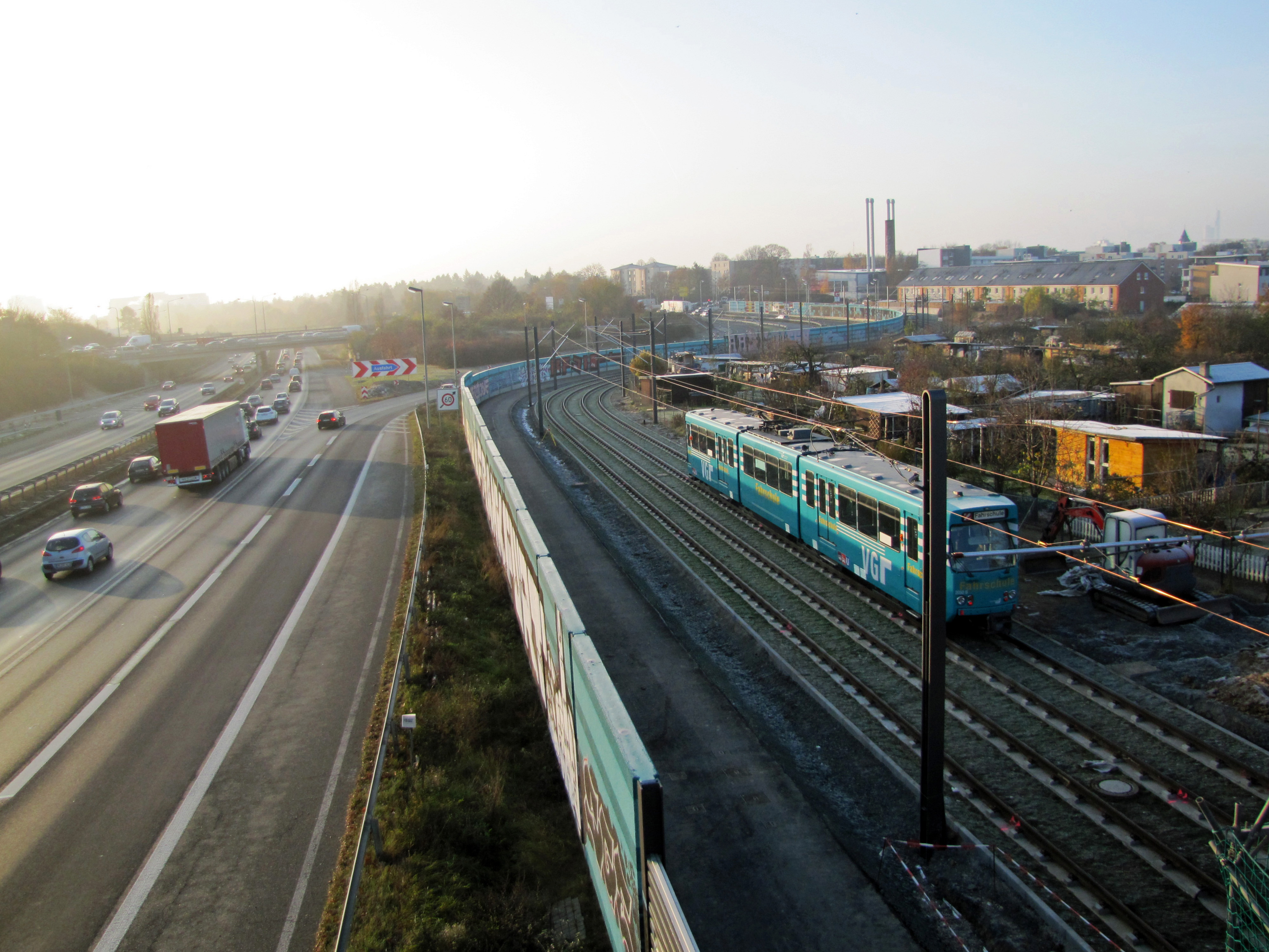 Neue Strassenbahnlinie Nr. 18, 2011 an der A 661 (Richtung „Konstabler Wache“) in Ffm. Unknown